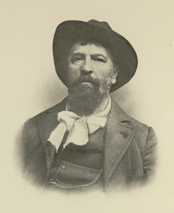 Retrato fotográfico Daniel Urrabieta Vierge, en las primeras páginas de la edición inglesa de Don Quijote de la Mancha de 1906 de Charles Scribner's Sons